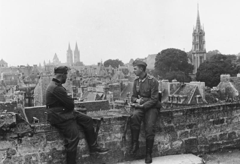 Blick von der Burgmauer auf Caen. Prop.Kp. 612 30.7.1940